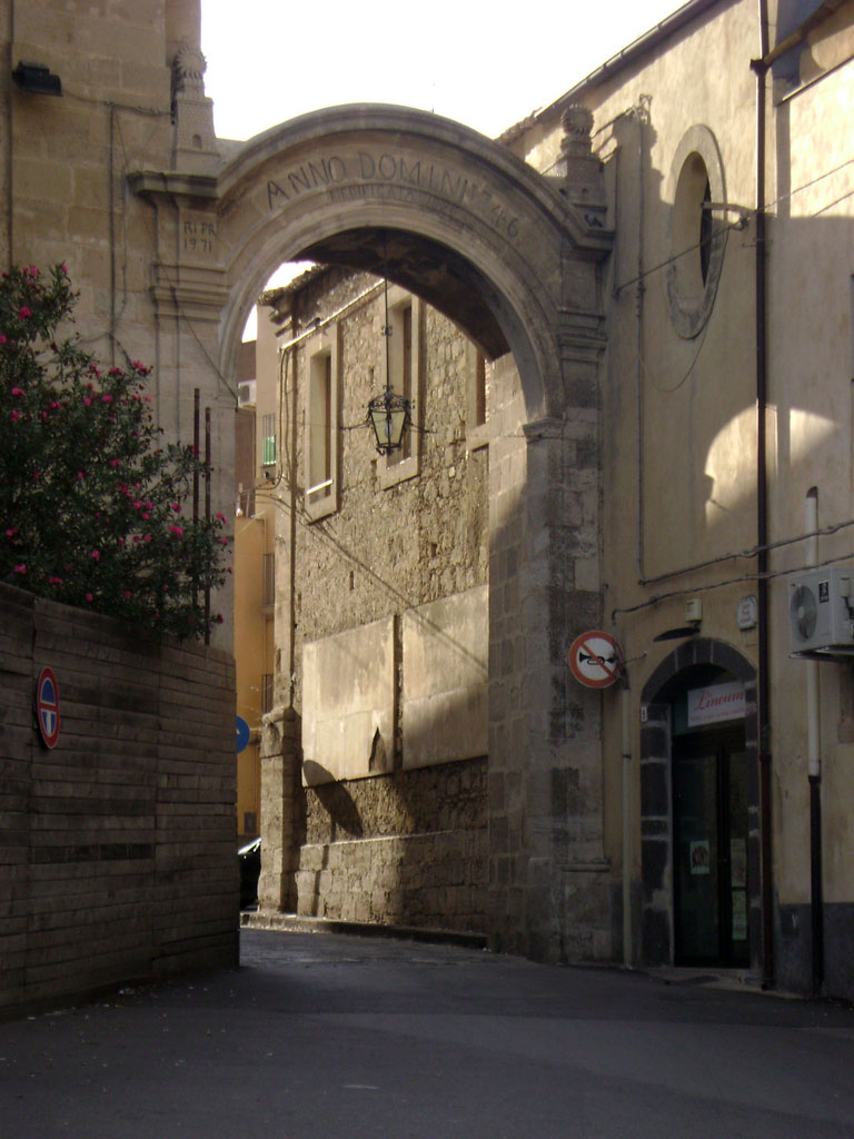 Mineo: Porta Adinolfo, Sicilia.